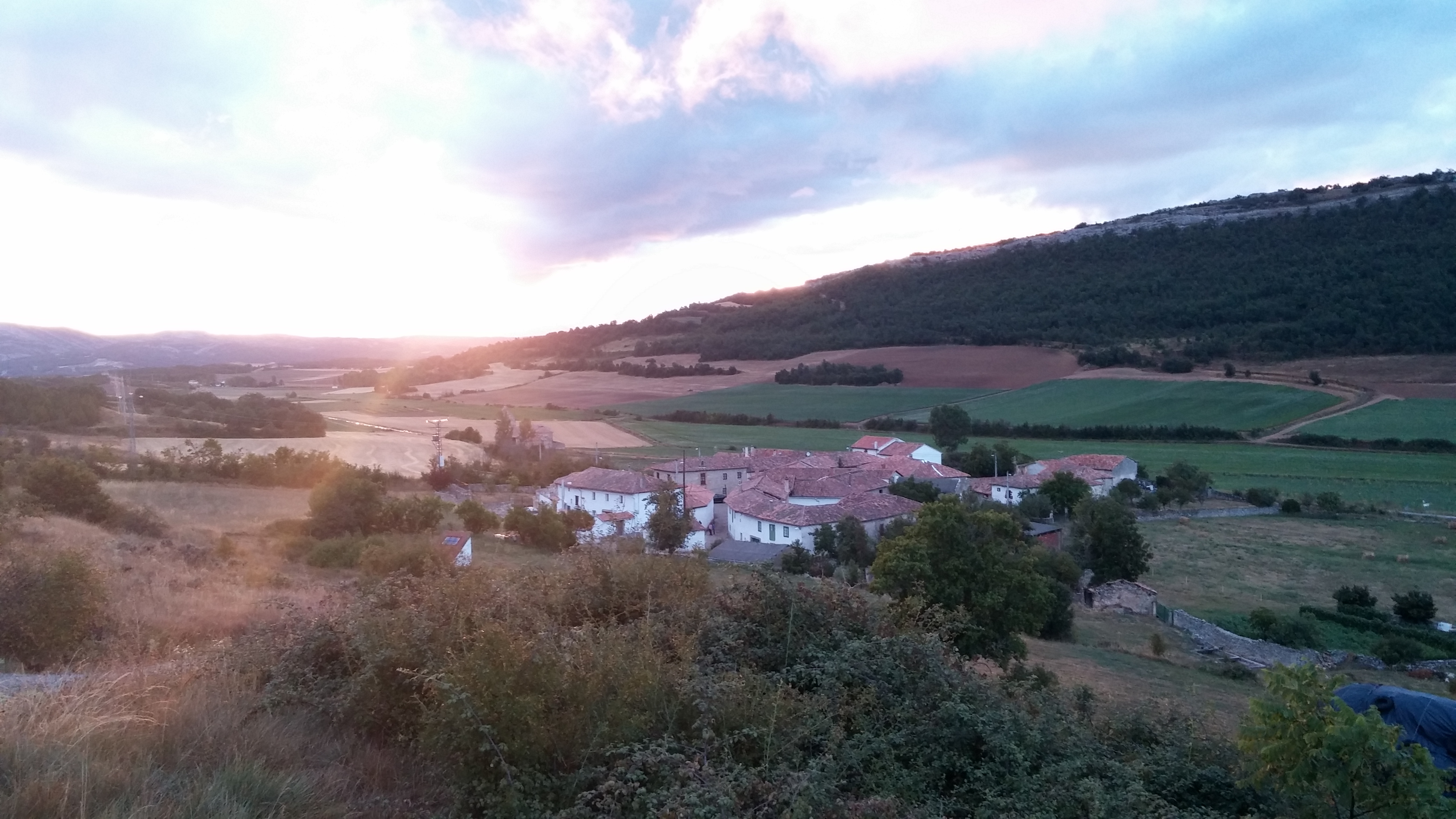 Vista del pueblo al atardecer